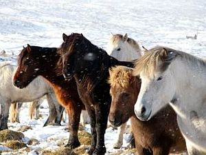 Winterhaltung in Island Fotograf: Drammetal